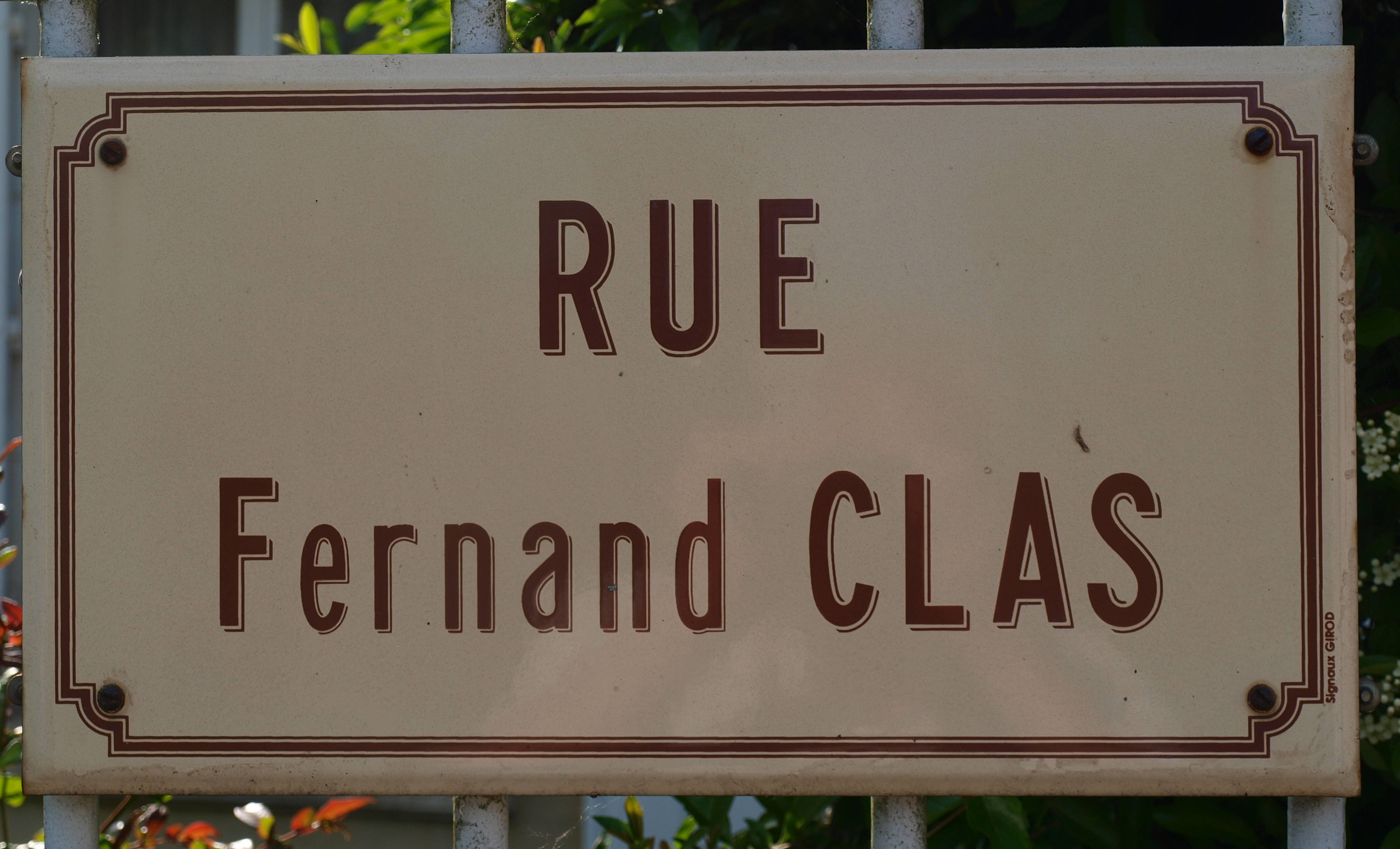 Leugny (Yonne, France) ; rue Fernand Clas.